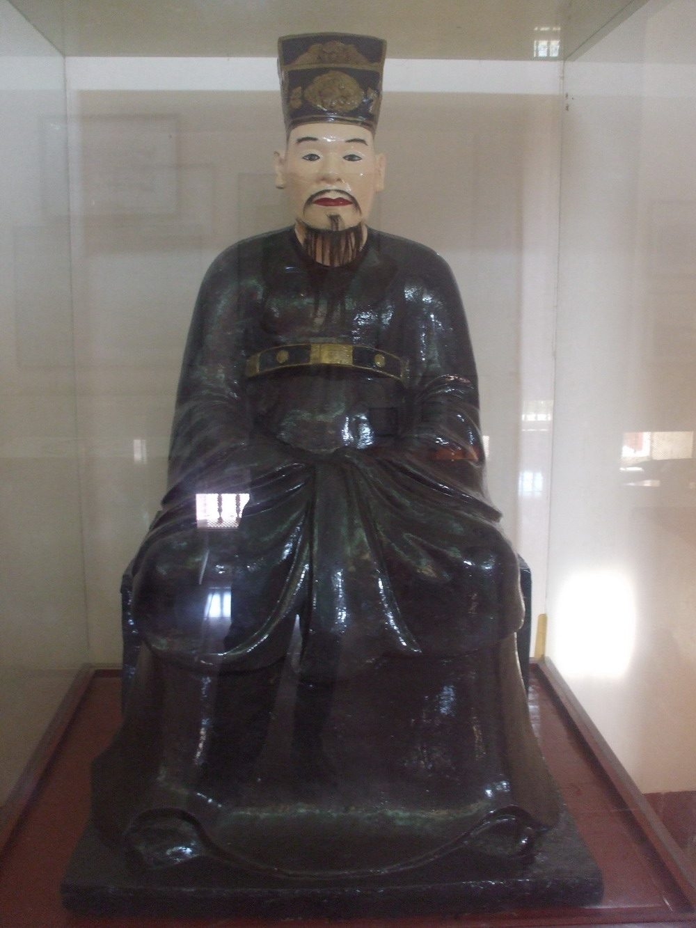 Tượng Đô đốc Đặng Tiến Đông tại Bảo Tàng Tây Sơn (Bình Định), được tạc đúng theo nguyên mẫu hiện ở chùa Trăm Gian (Hà Tây cũ, nay thuộc Hà Nội)